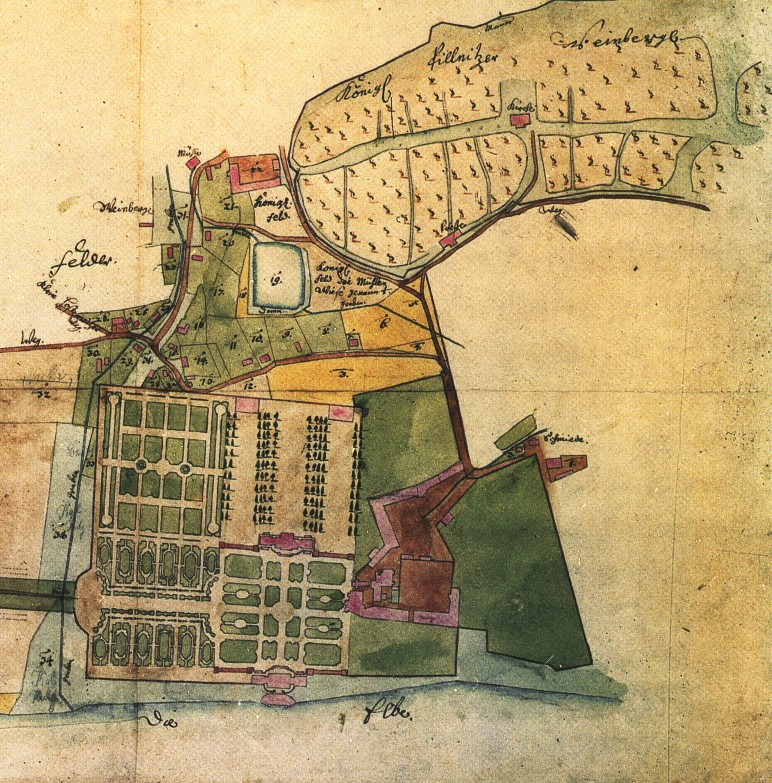 Karte des Pillnitzer Schlosses mit Schlosspark, Königlichem Weinberg und Weinbergkirche, Ausschnitt